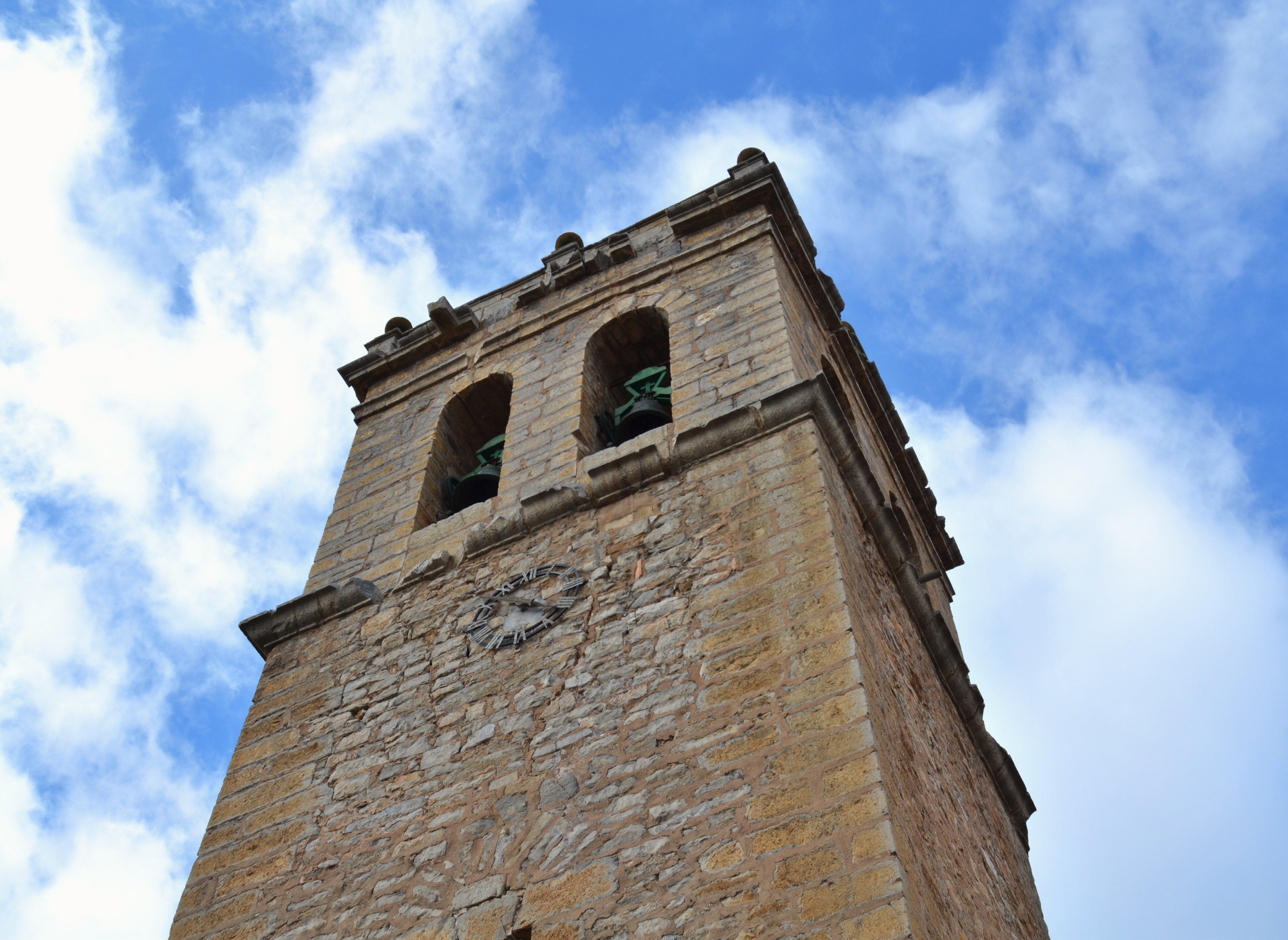 Campanar de l'església de sant Pere de Barracas.